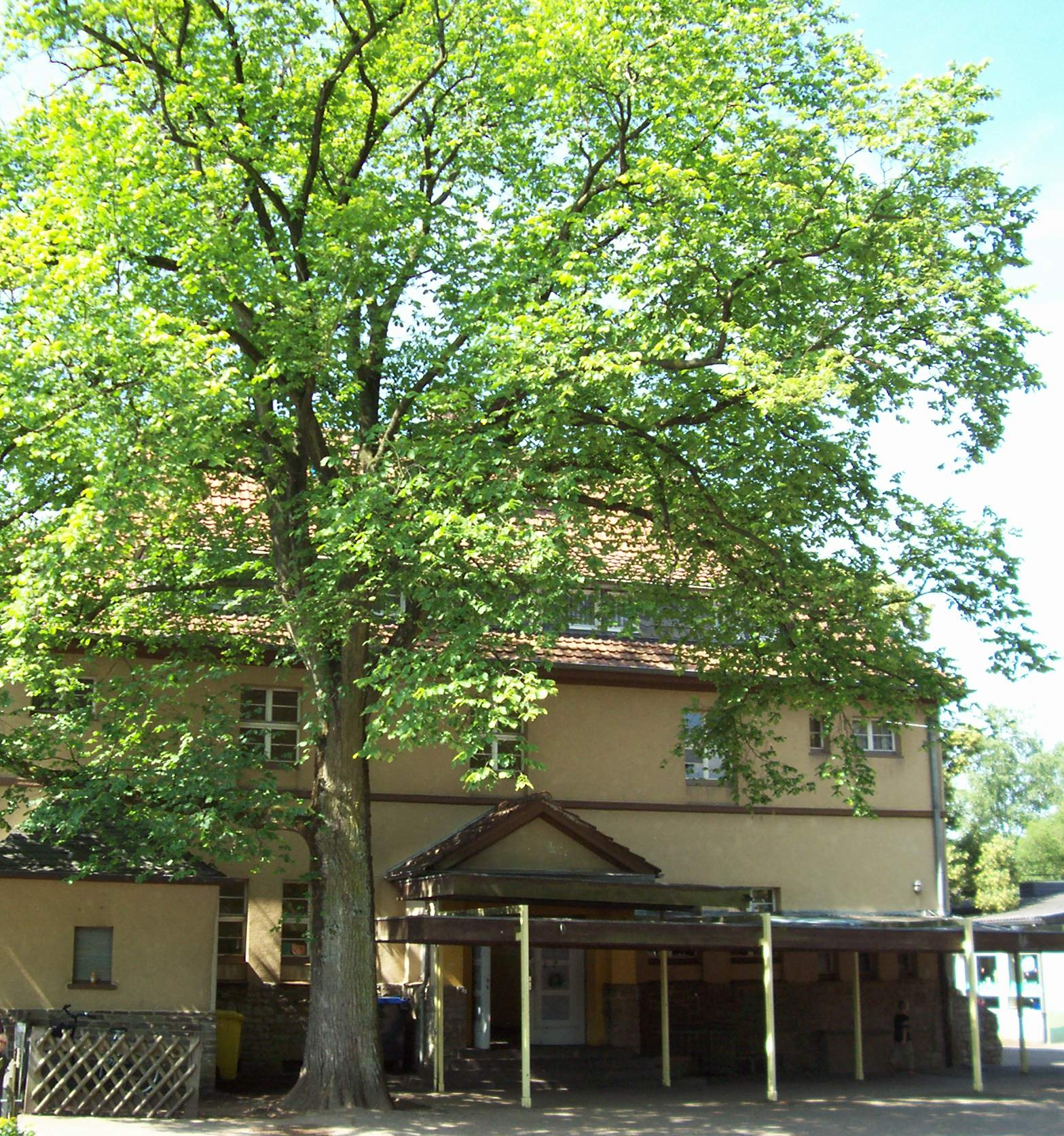 Altes Schulhaus (Baujahr 1920-1922) in Bergisch Gladbach Hand